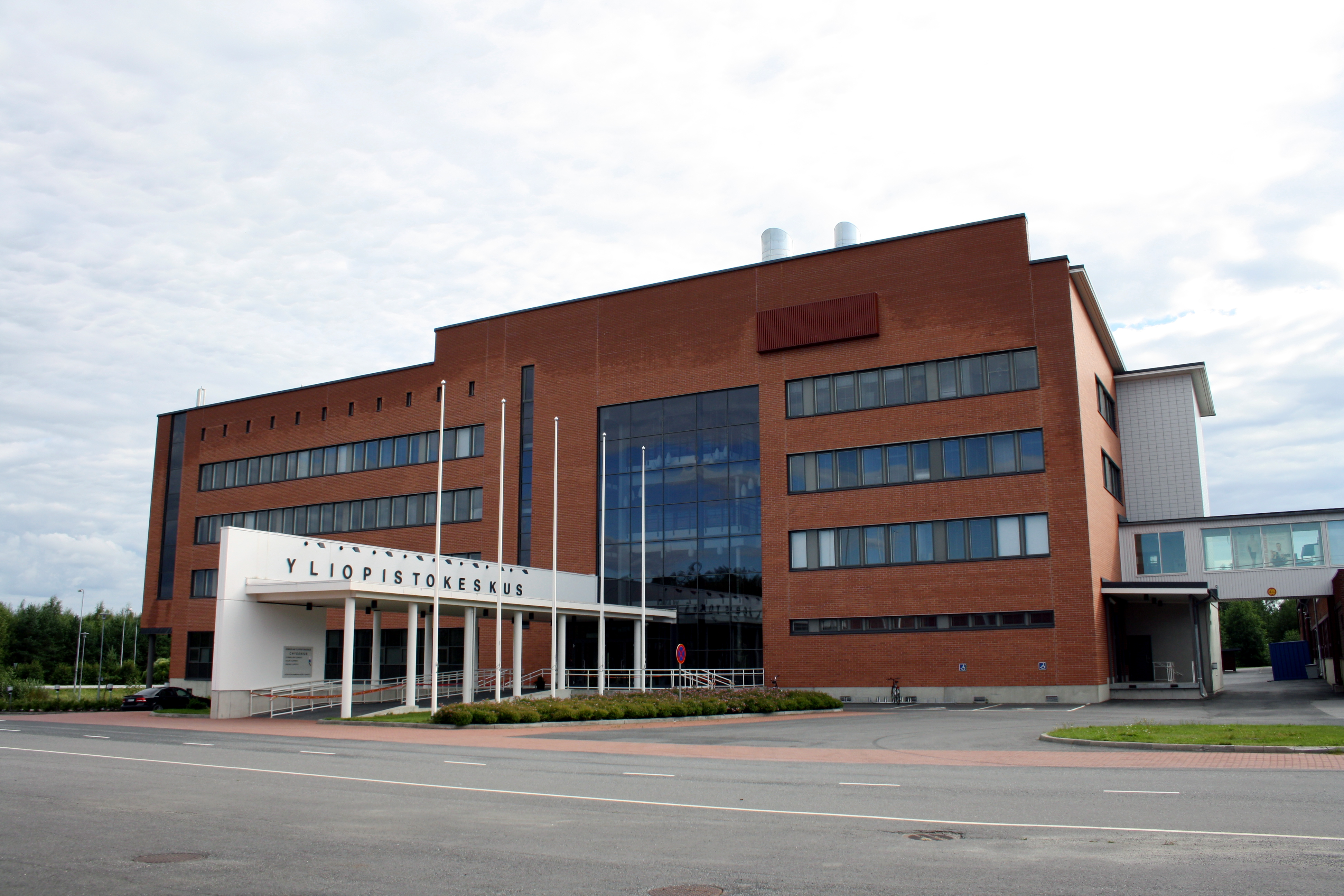 Kokkolan yliopistokeskus Kokkolassa, Suomessa.